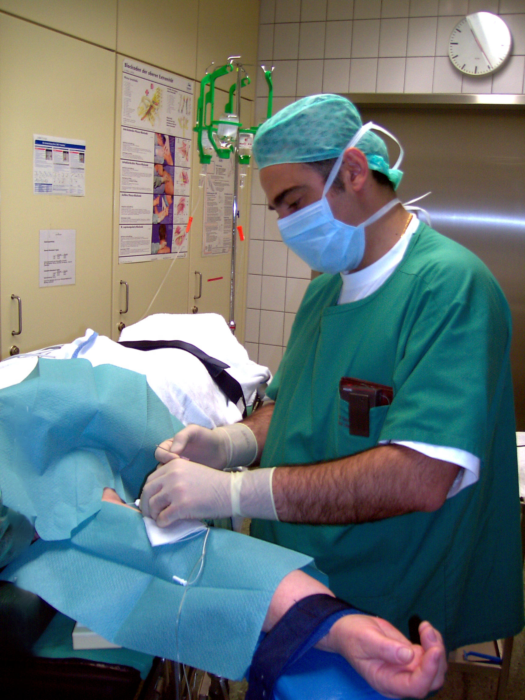 Regional anesteziya: qoltuq ya bazu kələfinin blokadası